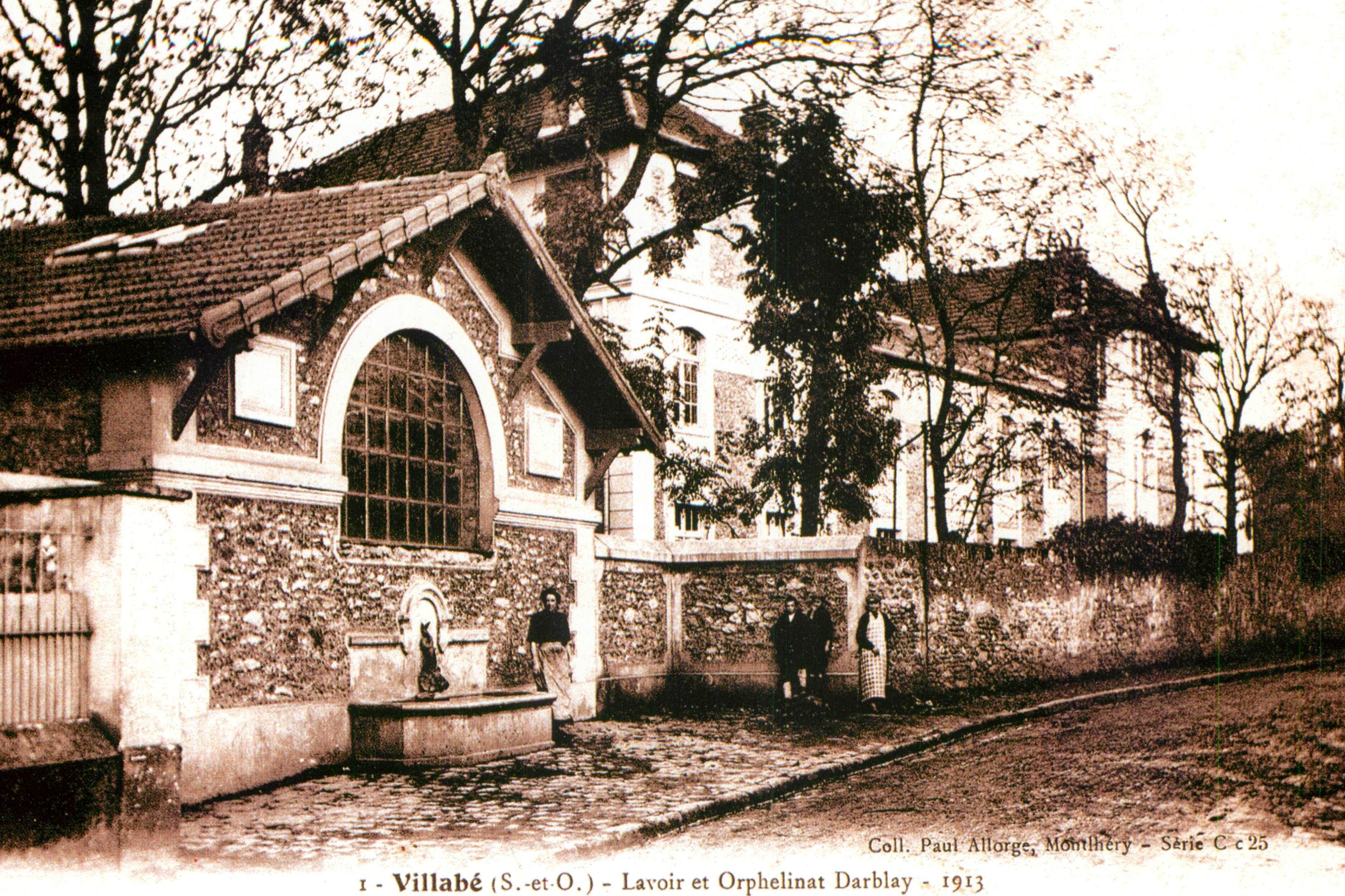 L'ancien lavoir et l'orphelinat de Villabé transformé en école primaire en 1957 / Villabé / Essonne / France